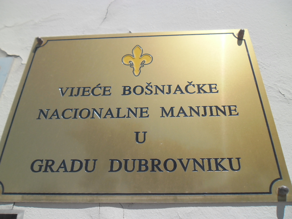 natpis kraj zgrade dubrovačkog Vijeća bošnjačke nacionalne manjine